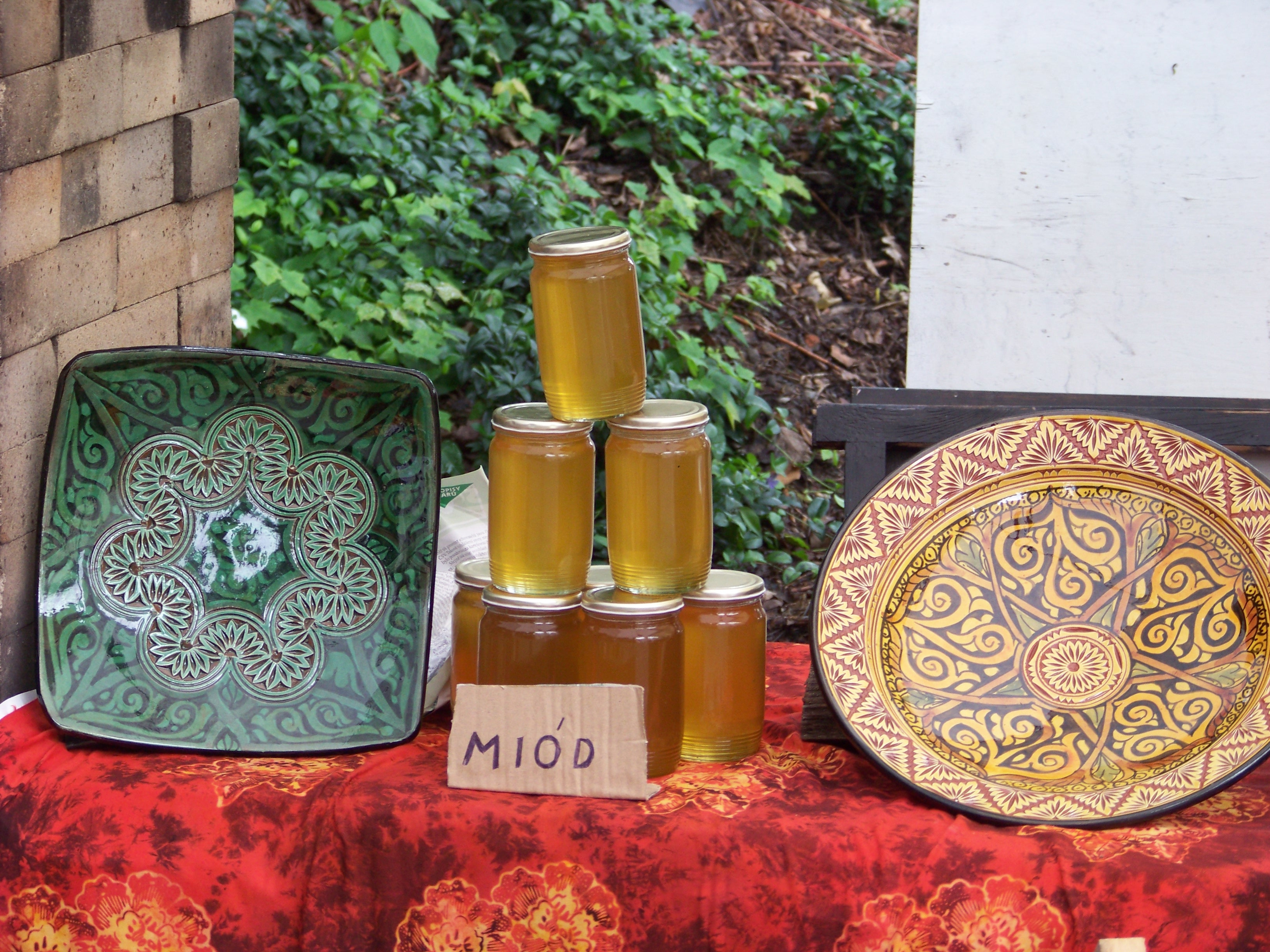 Święto Herbaty 2012 w Cieszynie.